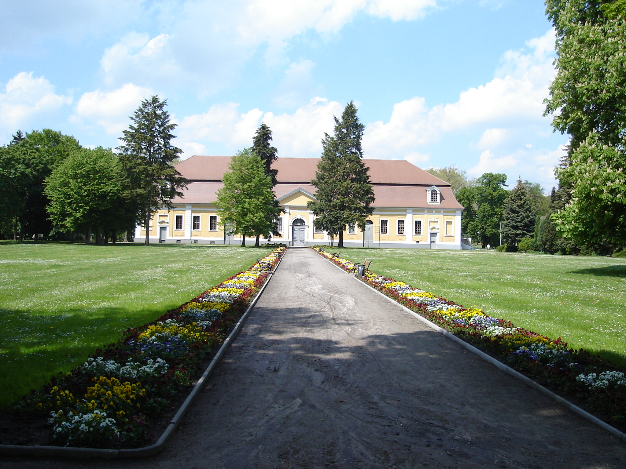 Zerbst, Stadthalle (früher: fürstliche Reitbahn)